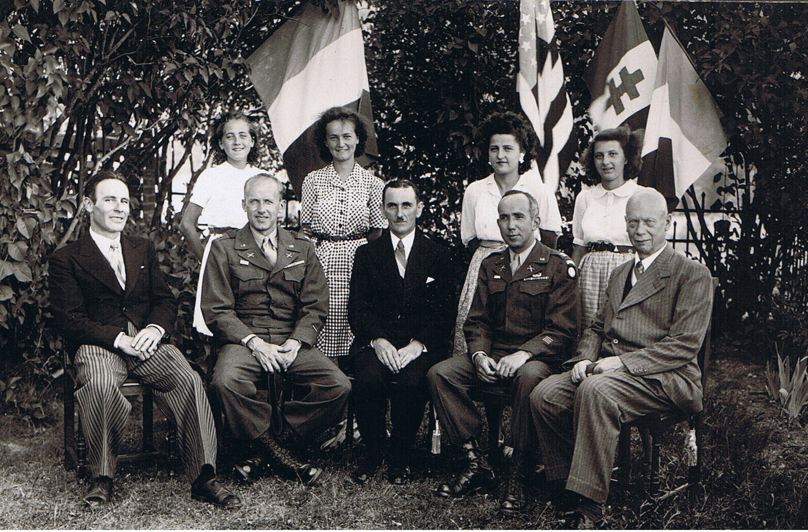 Mars 1945 : Arrivée des Américains à St-Etienne-lès-Remiremont (Vosges). À la fin de la guerre 1939-1945 Antoine Dinkel (à gauche sur la photo) fut, sur avis du Comité départemental de libération, en raison de son activité au sein du maquis des Vosges du Haut-du-Bois, désigné par le Préfet pour administrer Saint-Étienne-lès-Remiremont. En mars 1945. il accueille les Américains. Élu au scrutin du 06 mai 1945 et Maire le 26 mai 1945, il devient à 31 ans le plus jeune Maire de France. Il exercera jusqu’au 09 avril 1970, date à laquelle le Préfet acceptera sa démission à la suite de son deuxième infarctus. Il a été nommé Maire honoraire par arrêté du préfet des Vosges en juillet 1973. Identification des personnes sur la photo par André Thomas, Président des FFI de St-Étienne-lès-Remiremont, né le 10 février 1926 (il avait donc 17 ans lorsqu’il s’est engagé dans la résistance). À l’époque, modeleur mécanicien aux ateliers de construction de Remiremont (modèles en bois) A partir de la gauche : Antoine Dinkel, Maire de la commune; Jhonson, Américain; Auguste Broqué, adjoint au Maire; Américain ?; Claude André, adjoint au Maire En haut à partir de la gauche : Mlle Mourey; Mlle Annie Picard; Suzanne Broqué; ?